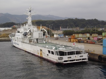 海上保安庁こしき、七ツ島港にて